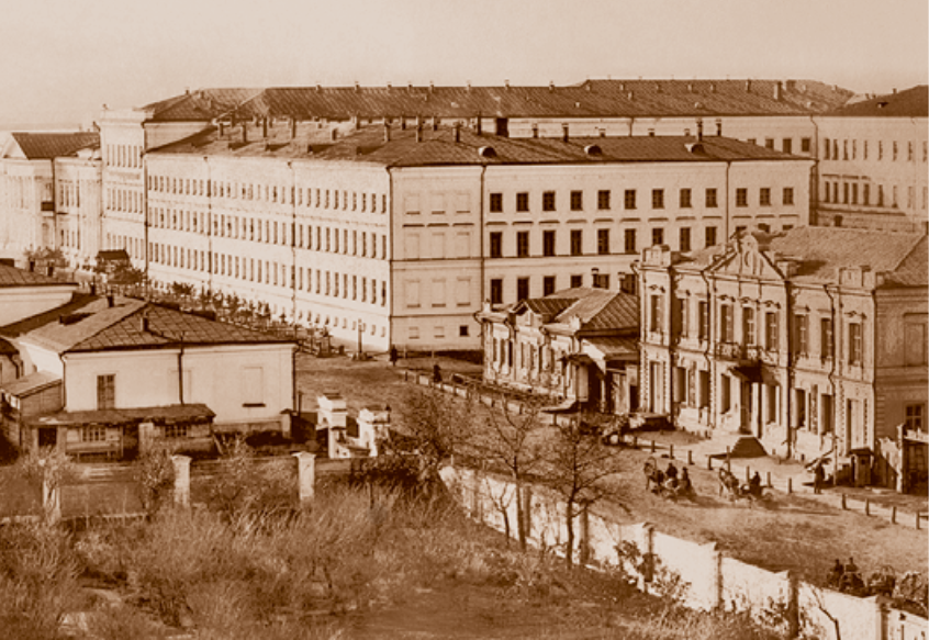 Казачий форштадт в Омске. Сибирский кадетский корпус на Атаманской улице (ныне ул. Ленина, 26). Фотография 1884 года из фондов МИСО.